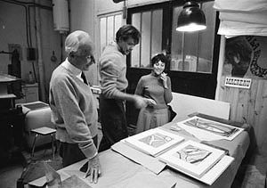 Bram van Velde (artiste) et Peter Bramsen (atelier de litho)